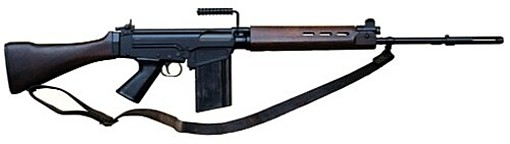 FN FAL - Fusil Automático Liviano. Calibre 7.62